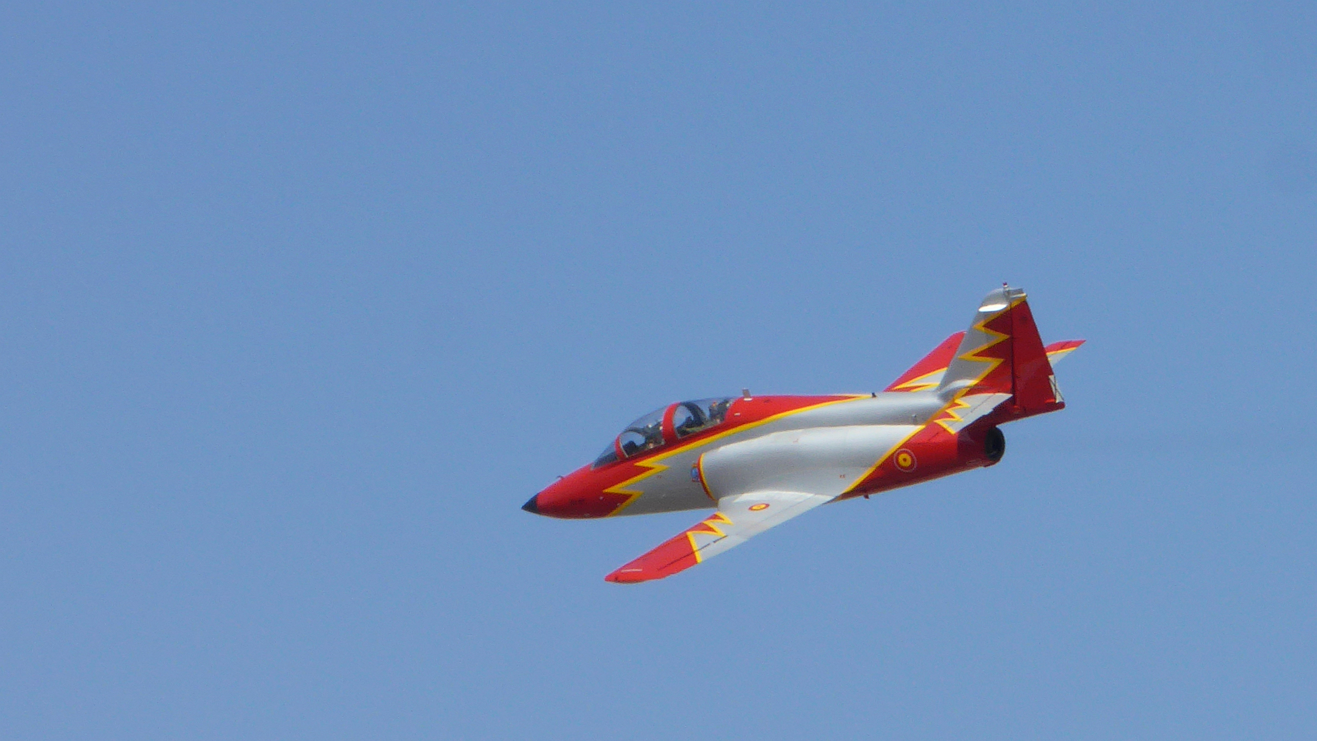 Patrulla Águila der spanischen Luftwaffe CASA C 101 Aviojet während Ausbildungsflug Militärflugplatz Base Aérea de San Javier Region Murcia Spanien - Foto Wolfgang Pehlemann P1120549